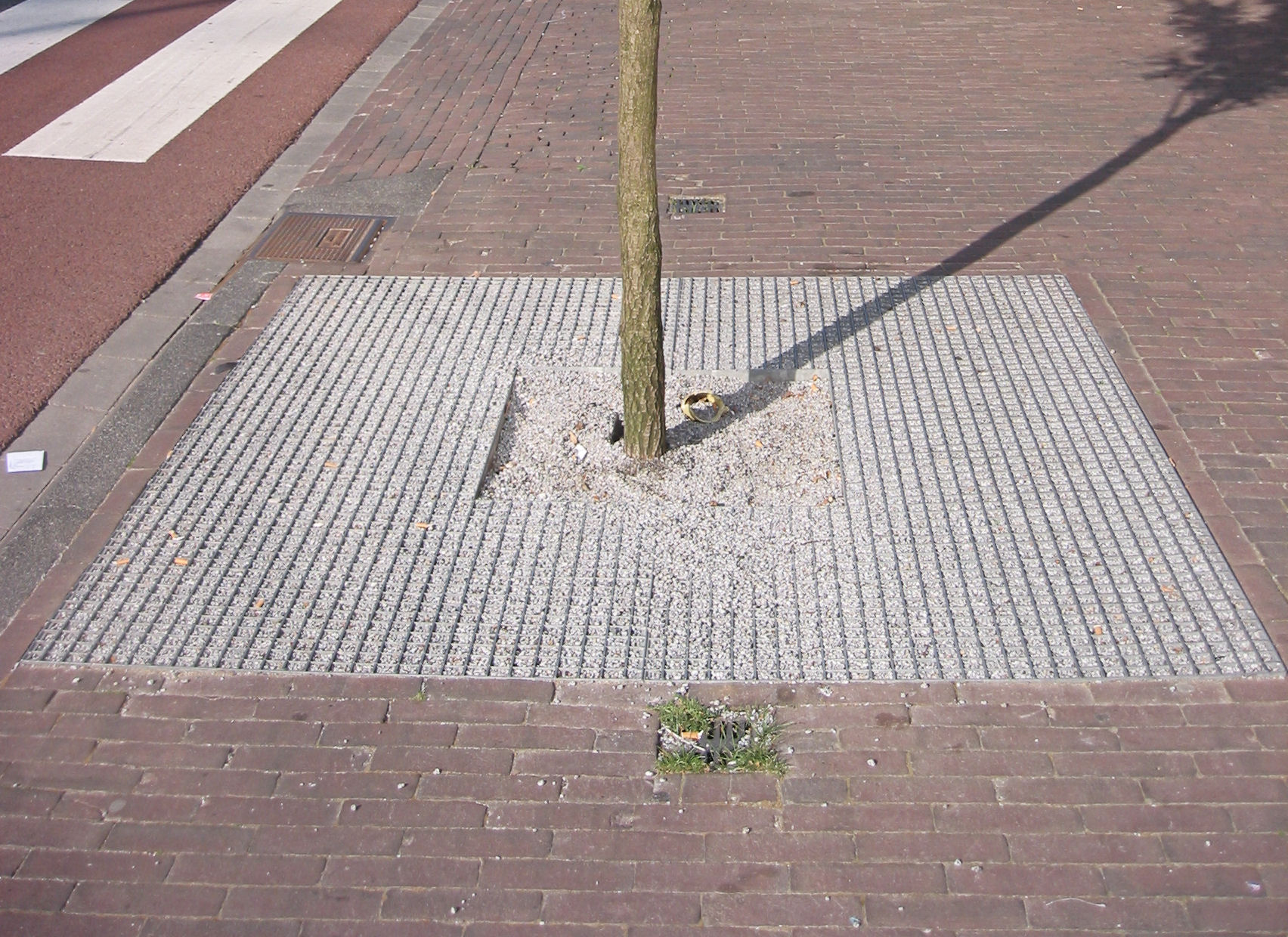 Boomspiegel